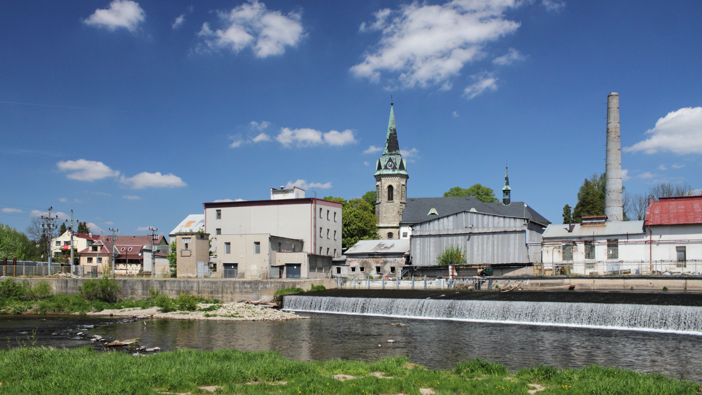 Přepeře